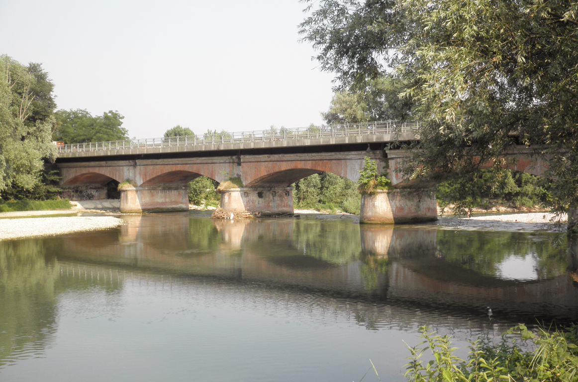 Ponte stradale sul fiume Oglio fra Orzinuovi e Soncino